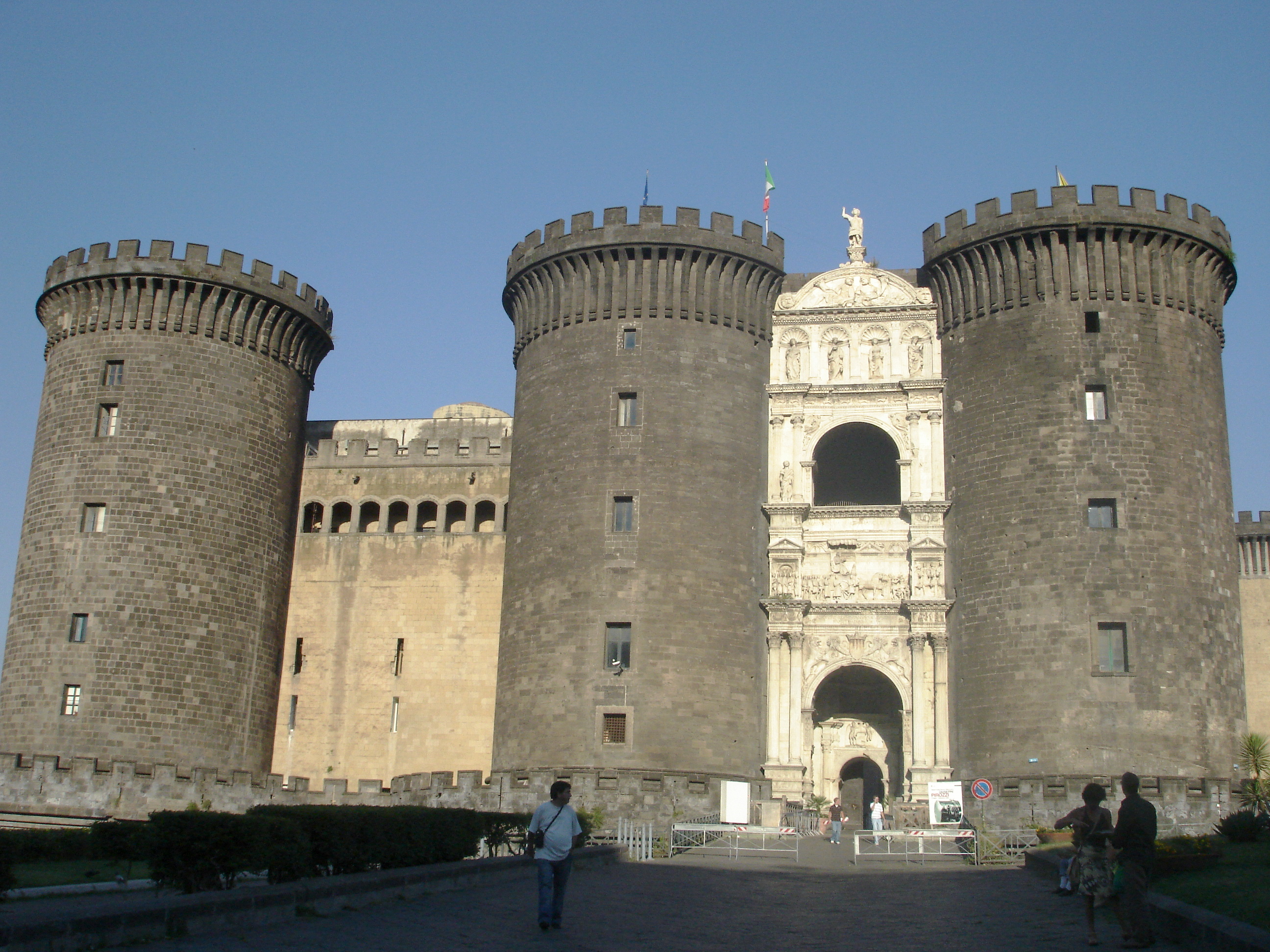 Castel Nuovo à Napoli